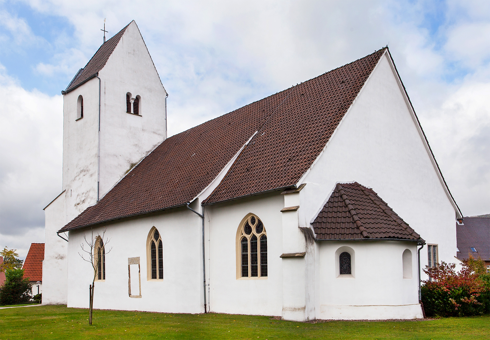 Evangelische Kirche in Holzhausen (Porta Westfalica) This is a photograph of an architectural monument.